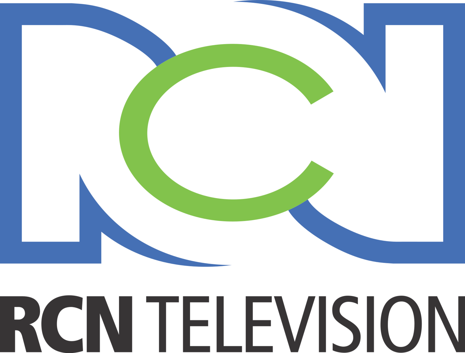 RCN Televisión Logo